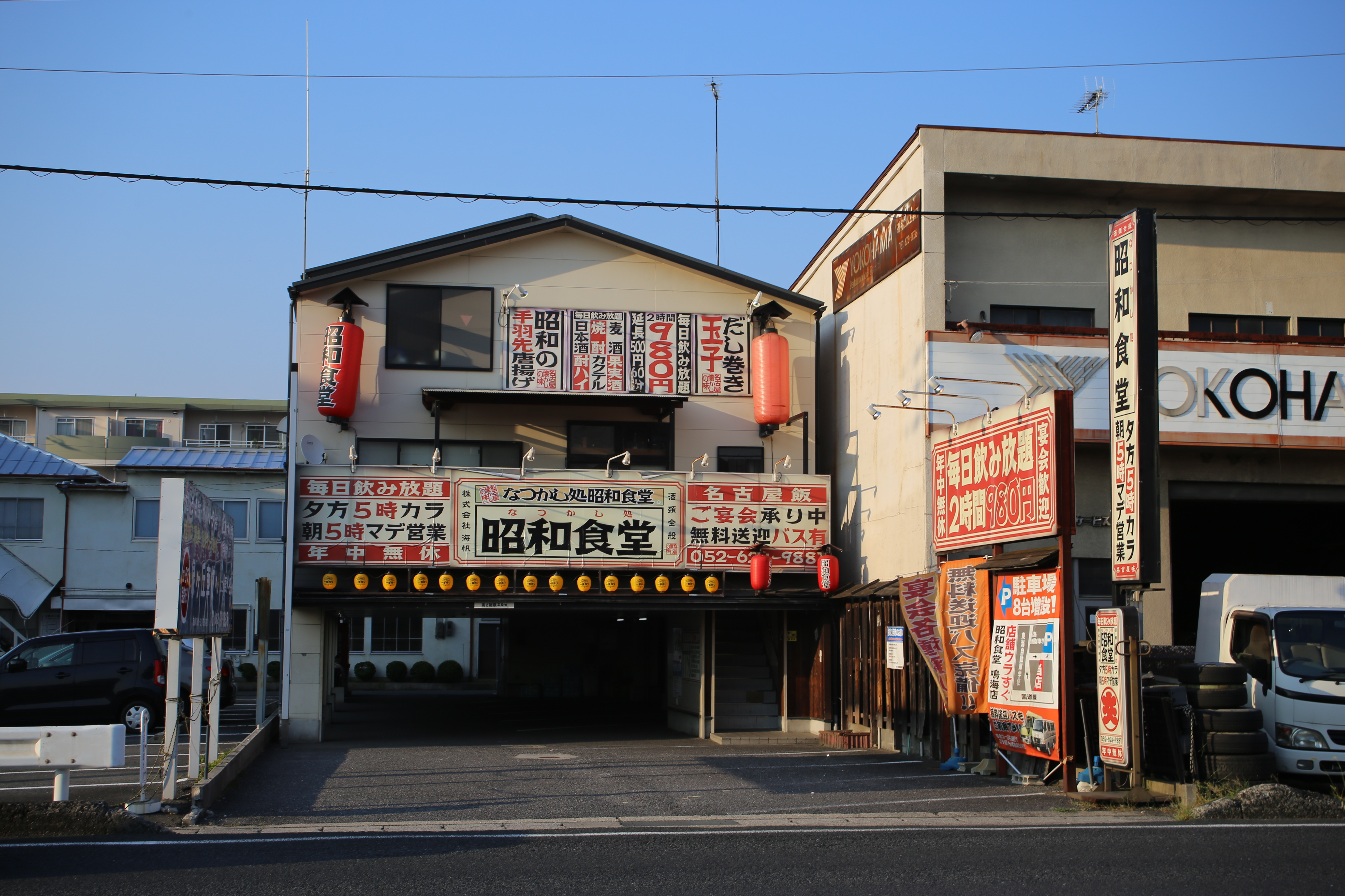 名古屋市緑区鳴海町上汐田の昭和食堂鳴海店を南側公道より撮影